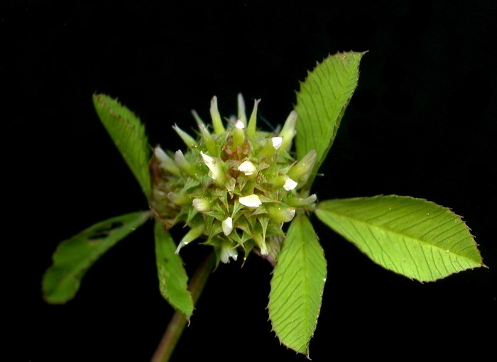 Hojas e inflorescencia de Trifolium glomeratum